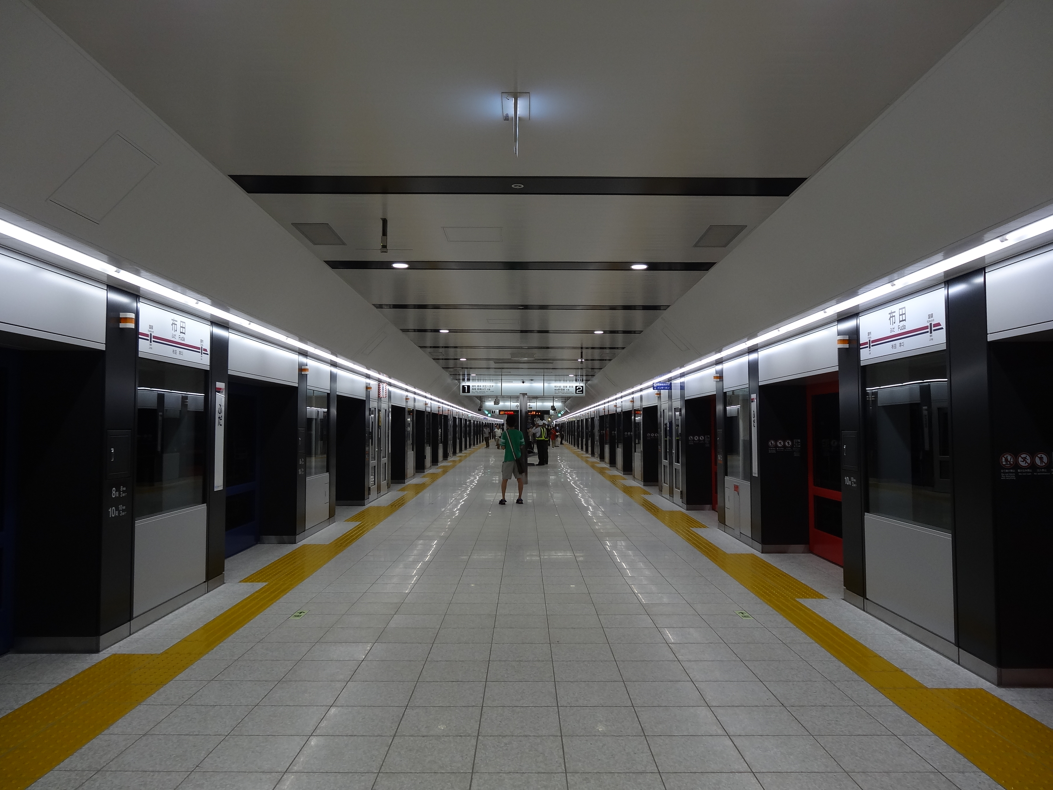 地下化後の布田駅ホーム